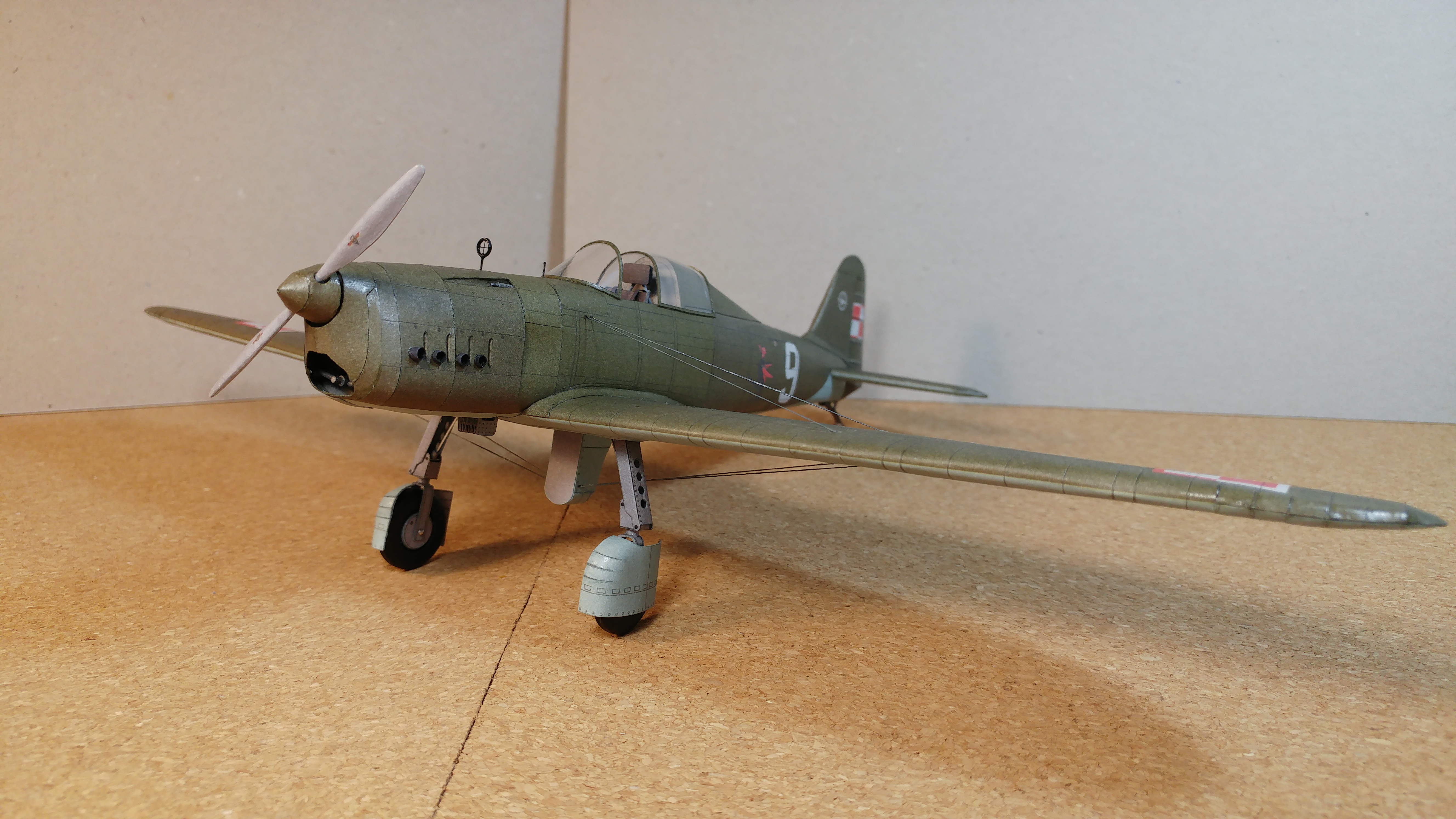 Model kartonowy LWS-4 (PZL.39) wydawnictwa WAK